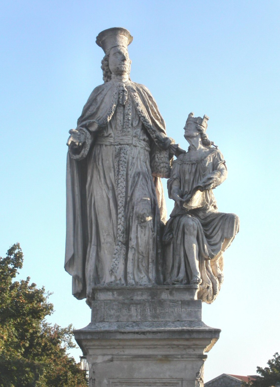 Statua raffigurante Andrea Memmo in Prato della Valle a Padova no. 44